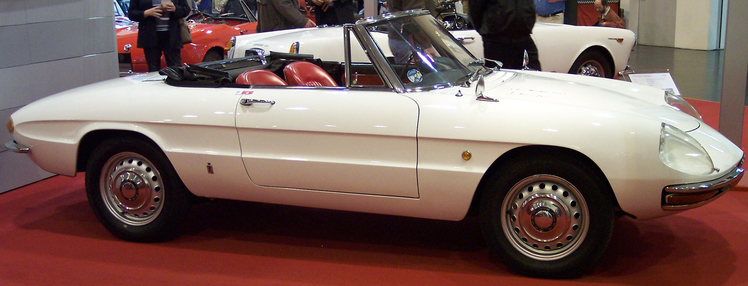 Alfa Romeo 1600 Spider 1965